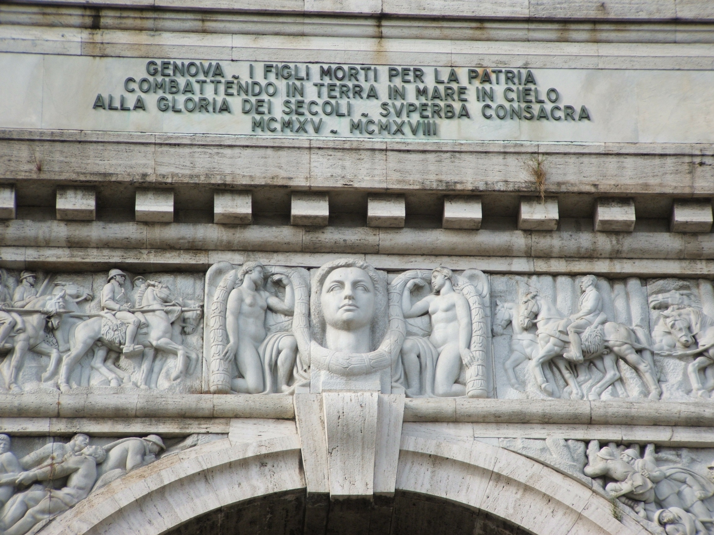 Genova, Piazza della Vittoria, inscrizione nel Monumento al milite ignoto